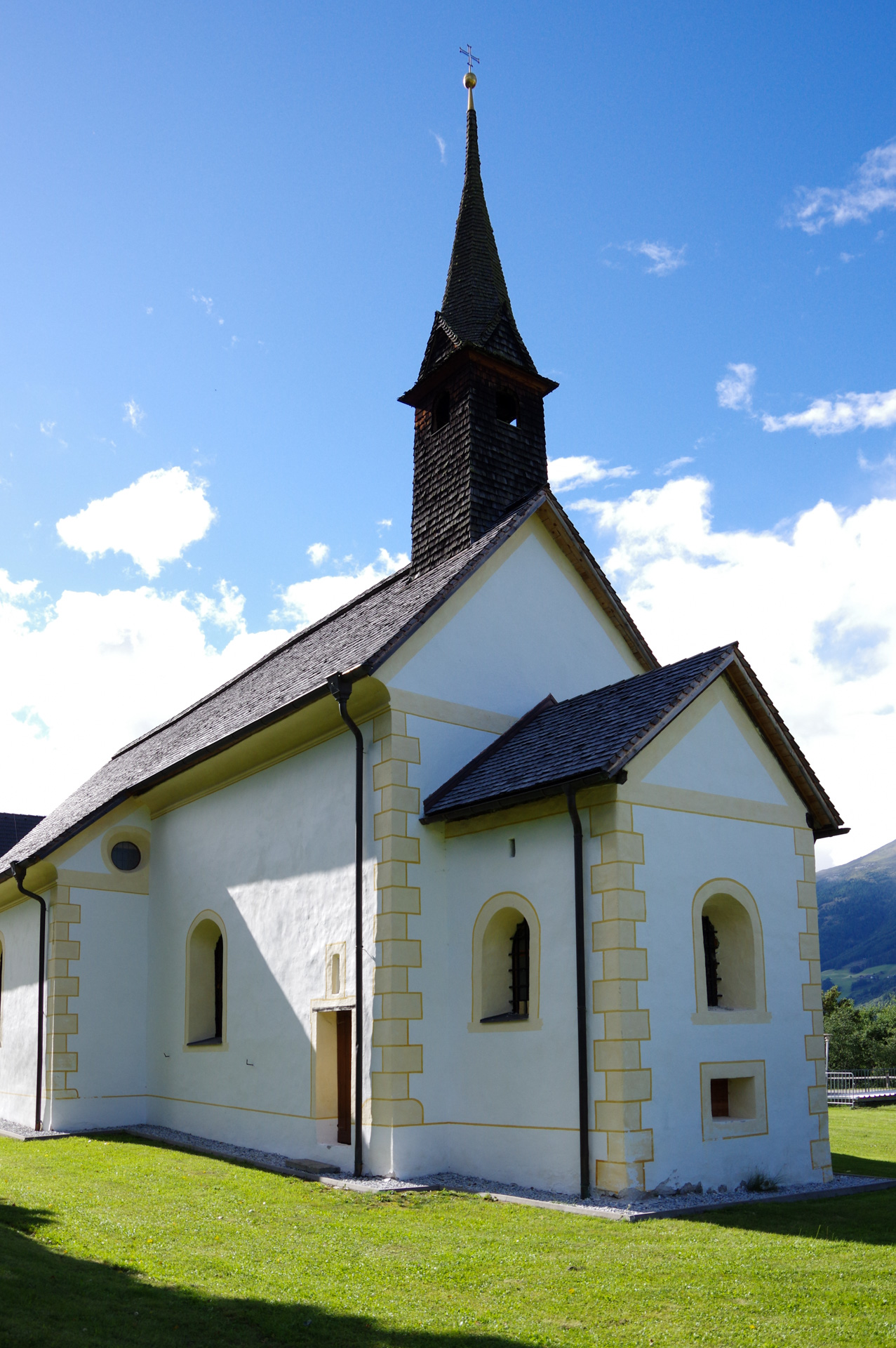 Kath. Filialkirche hl. Augustinus